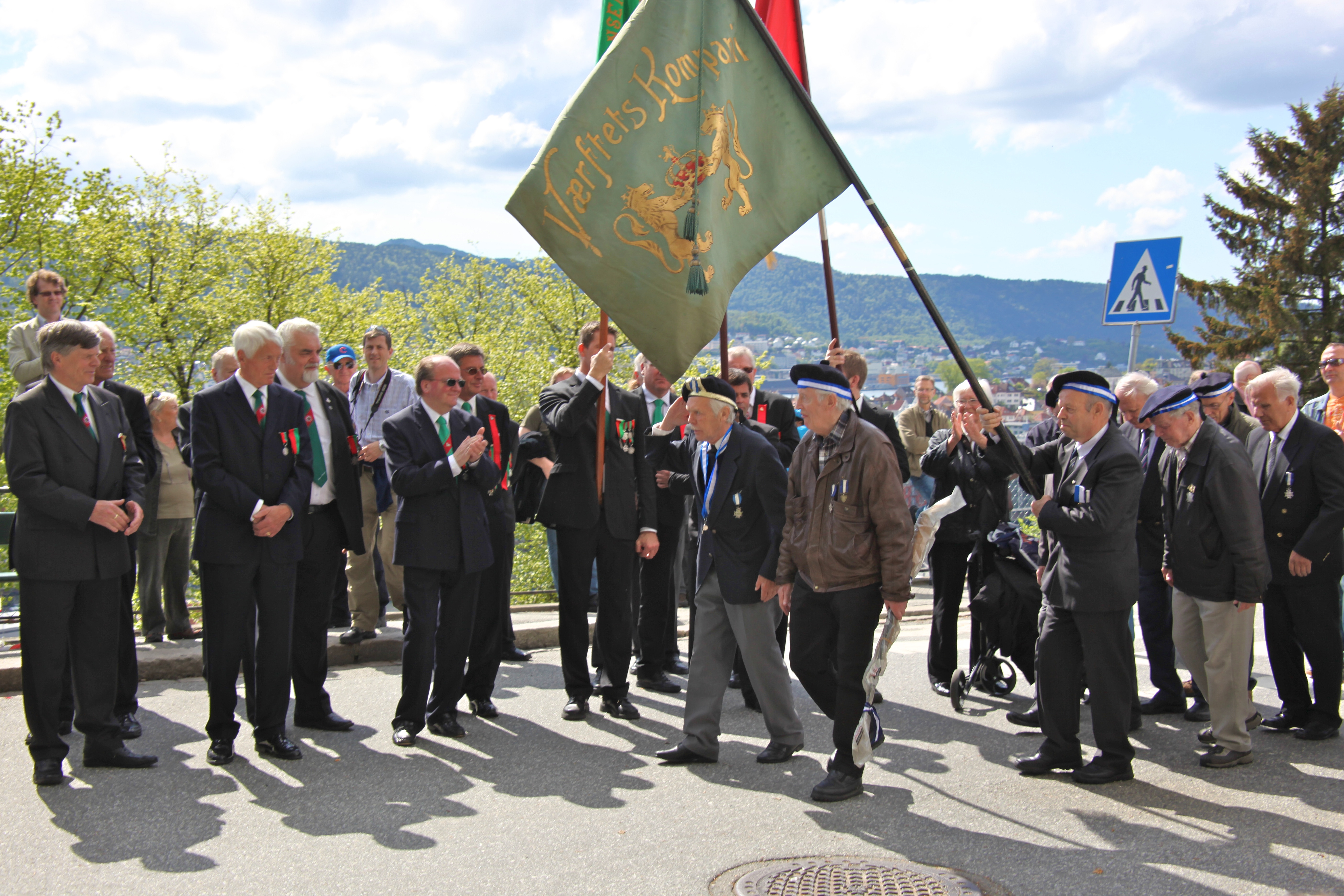 Verftes kompani